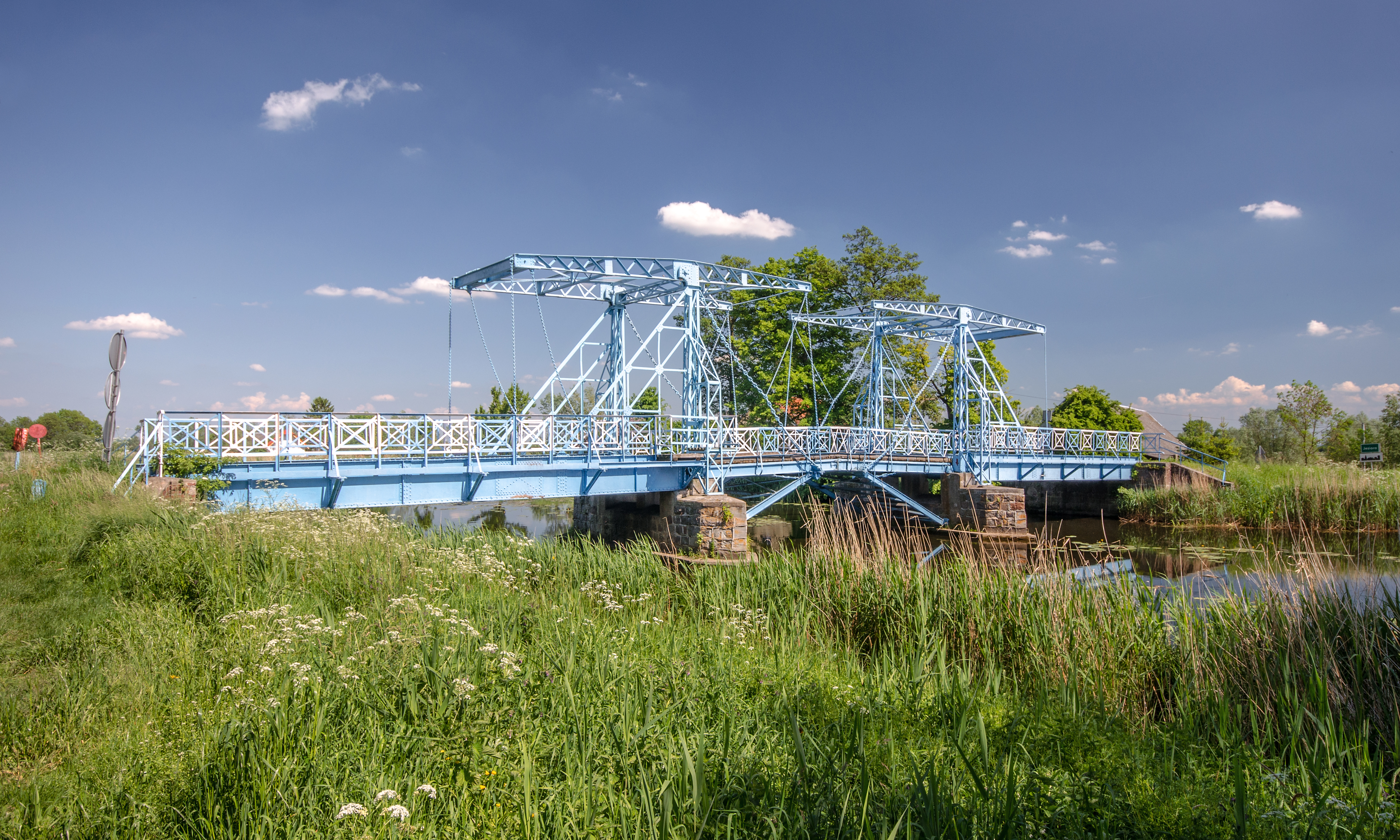 Jezioro, most drogowy zwodzony nad rz. Tyną, 1895